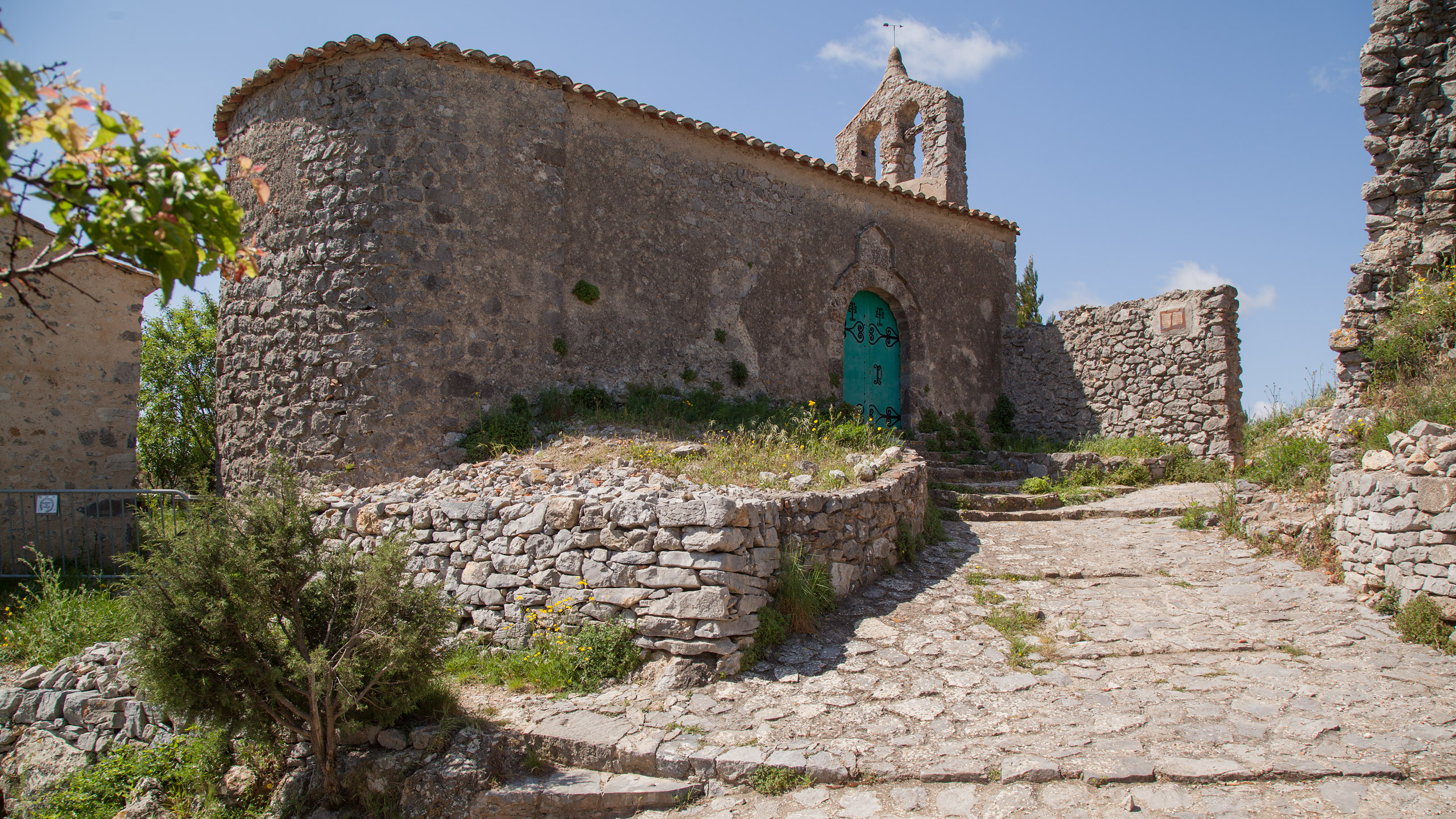 L'église